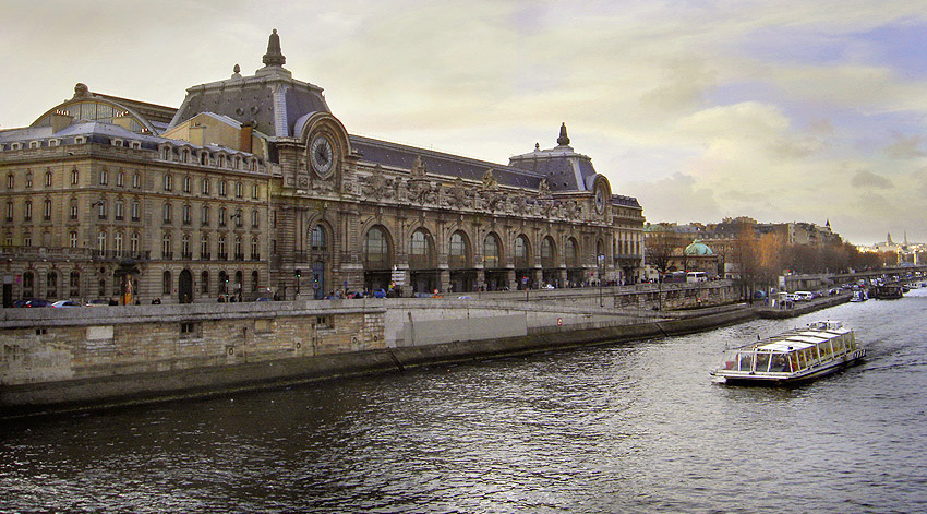 Fachada do Museu de Orsay, Paris.